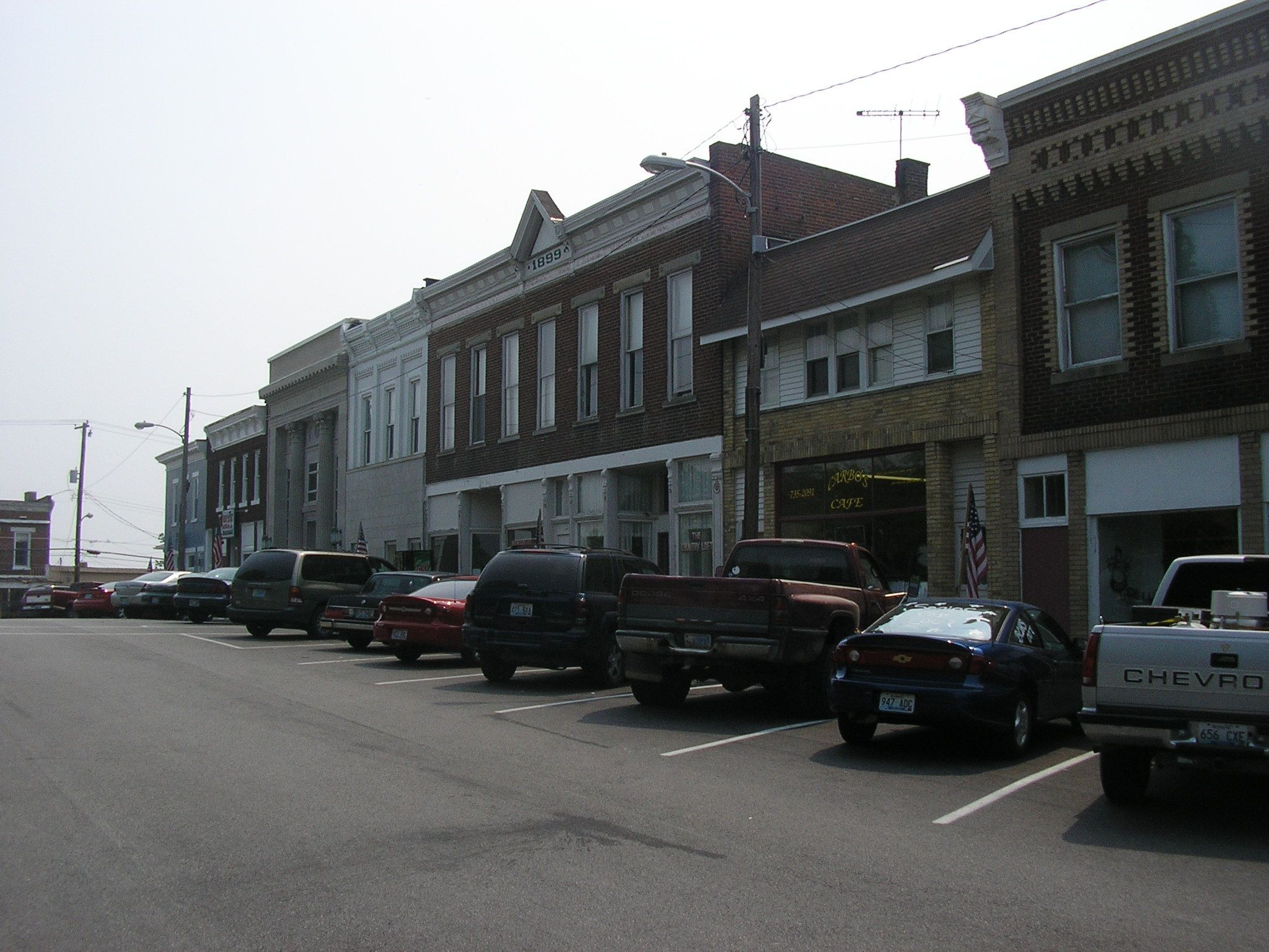 Brooksville, Kentucky